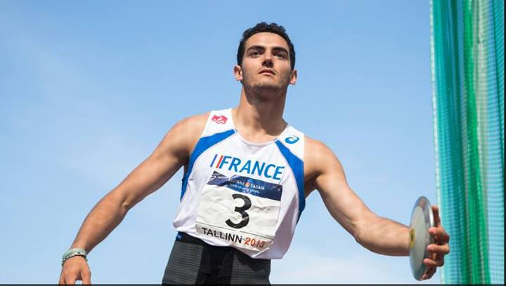 lors des ECCE